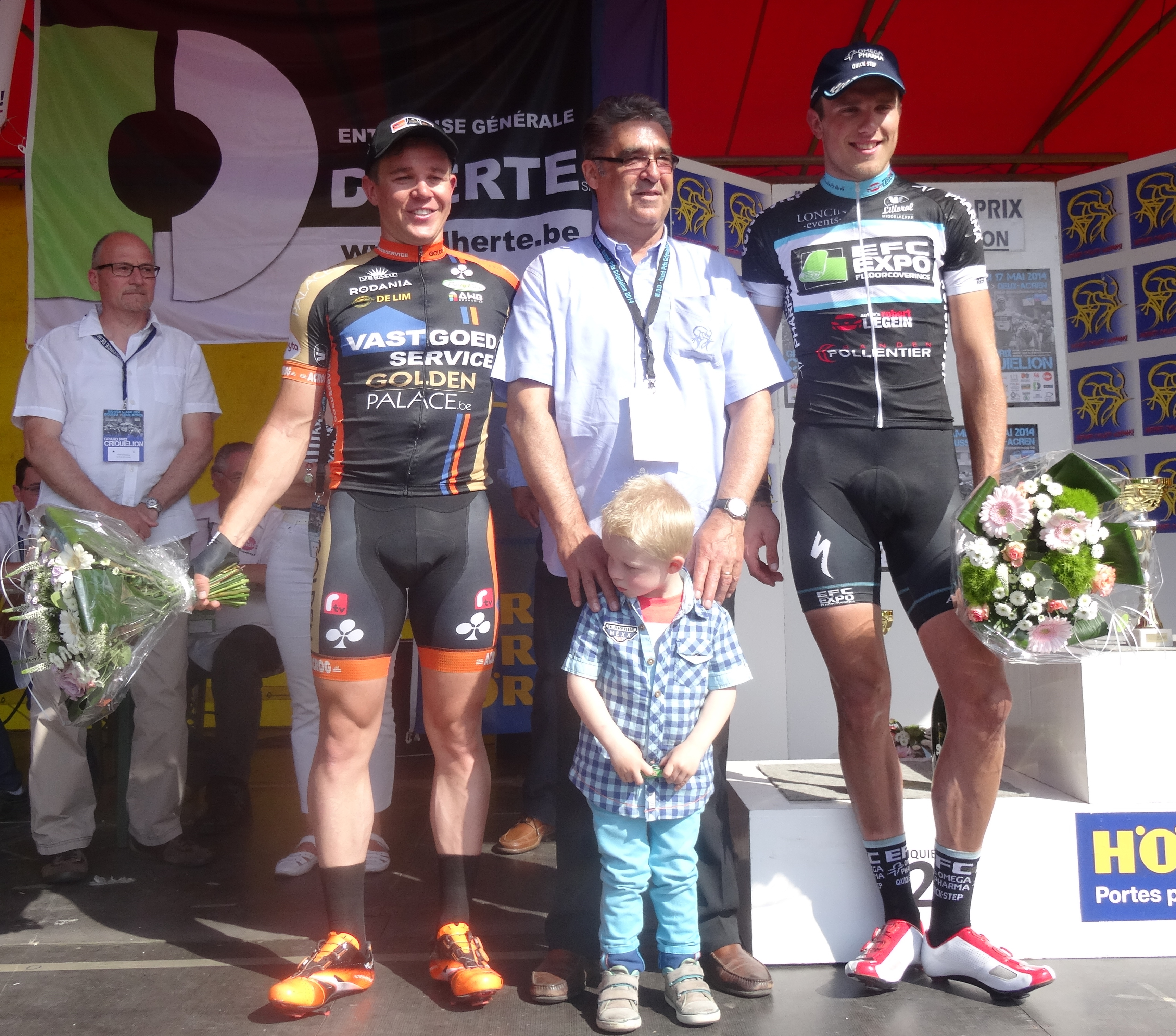 Grand Prix Criquielion 2014, Deux-Acren.